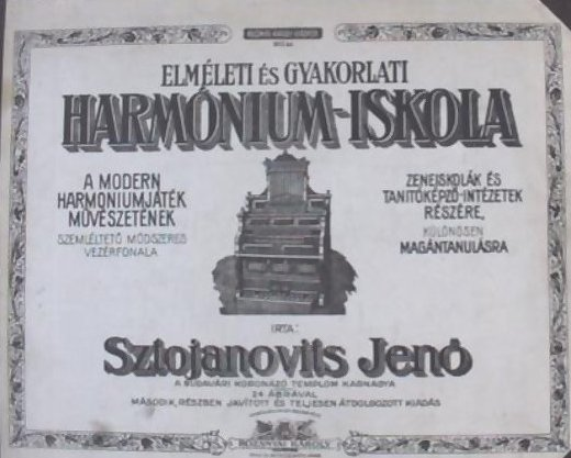 Elméleti és gyakorlati harmónium-iskola/Der neue Organist 3ter Theil. Rozsnyai Károly Könyv- és Zenemű-Kiadó.